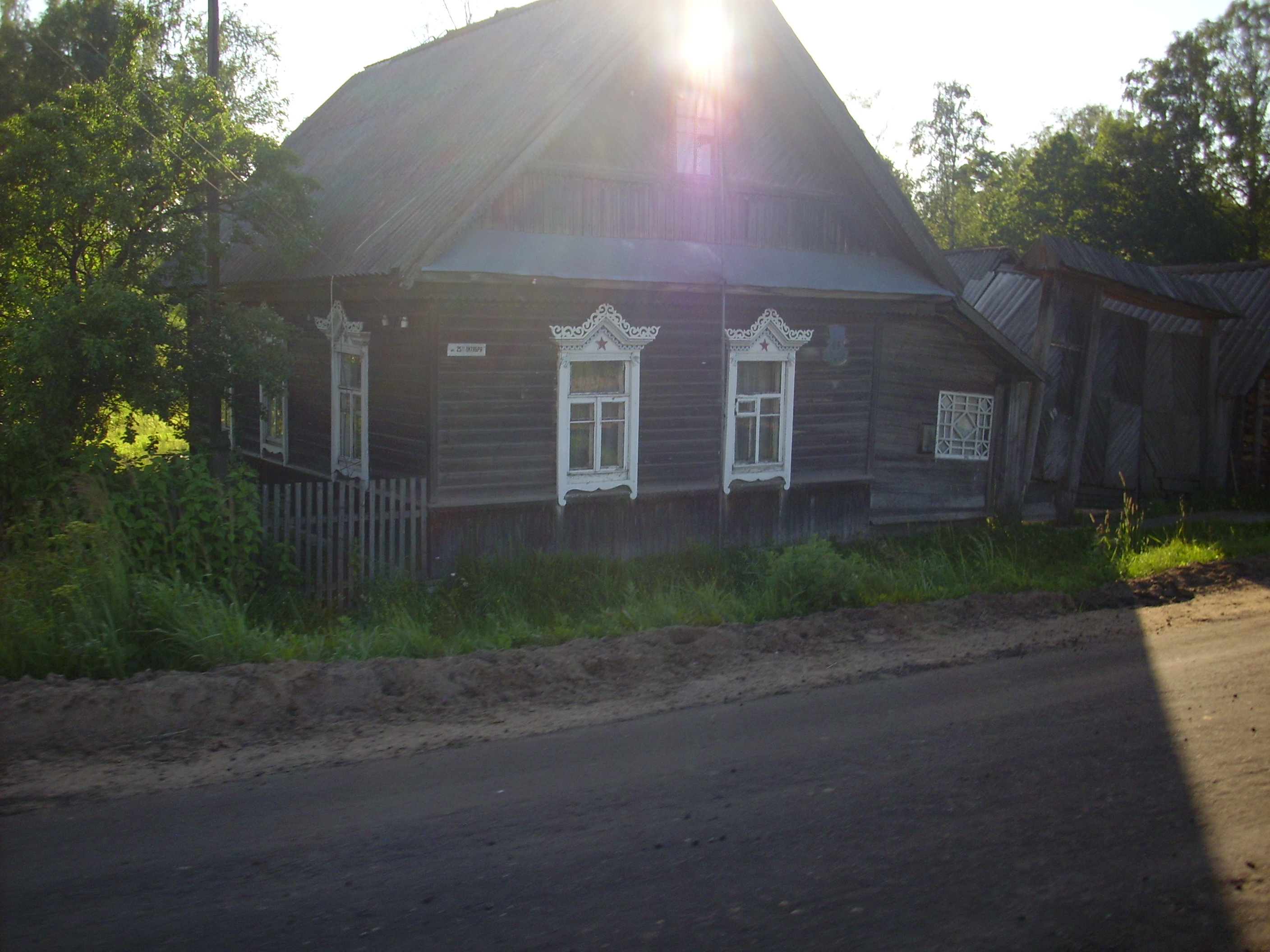 Усвяты